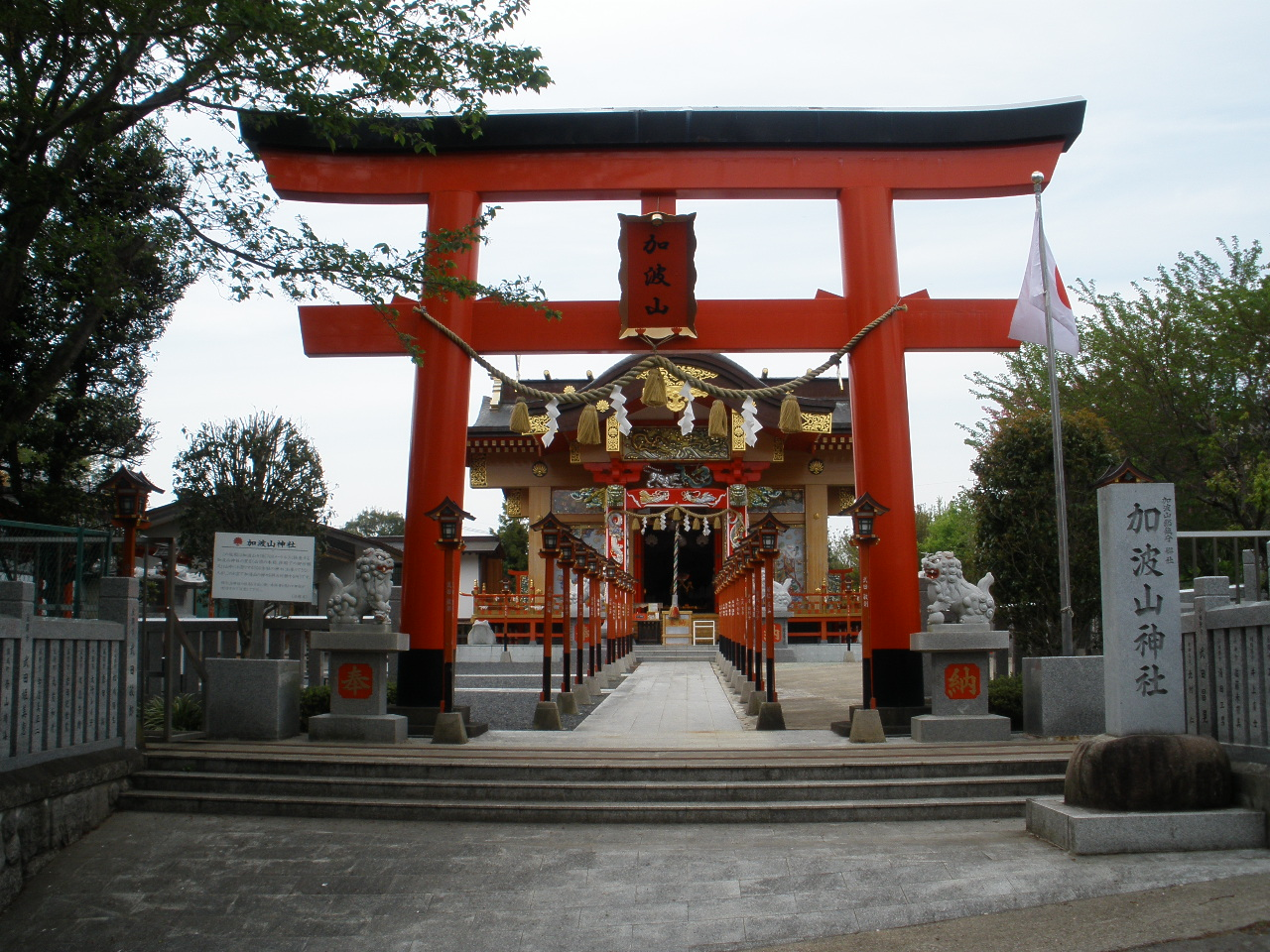 日本国茨城県の加波山神社（真壁拝殿）